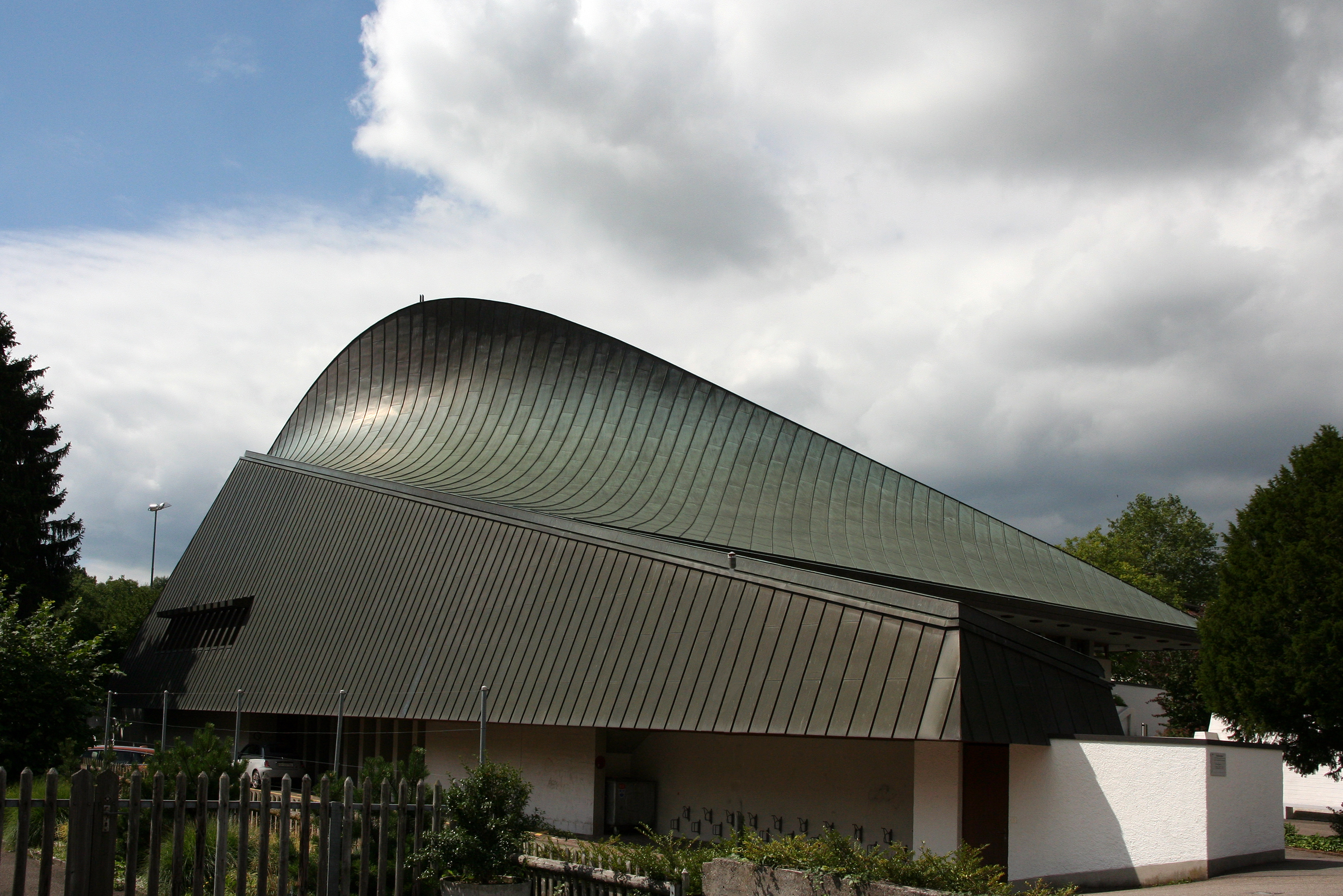 Römisch-katholische Pfarrkirche St. Elisabeth Kilchberg ZH, Aussenansicht von Norden